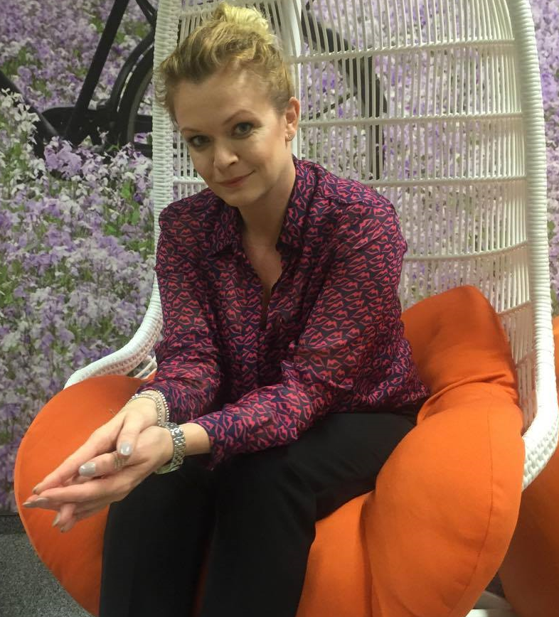 Polska aktorka Daria Widawska we wrześniu 2016 roku.